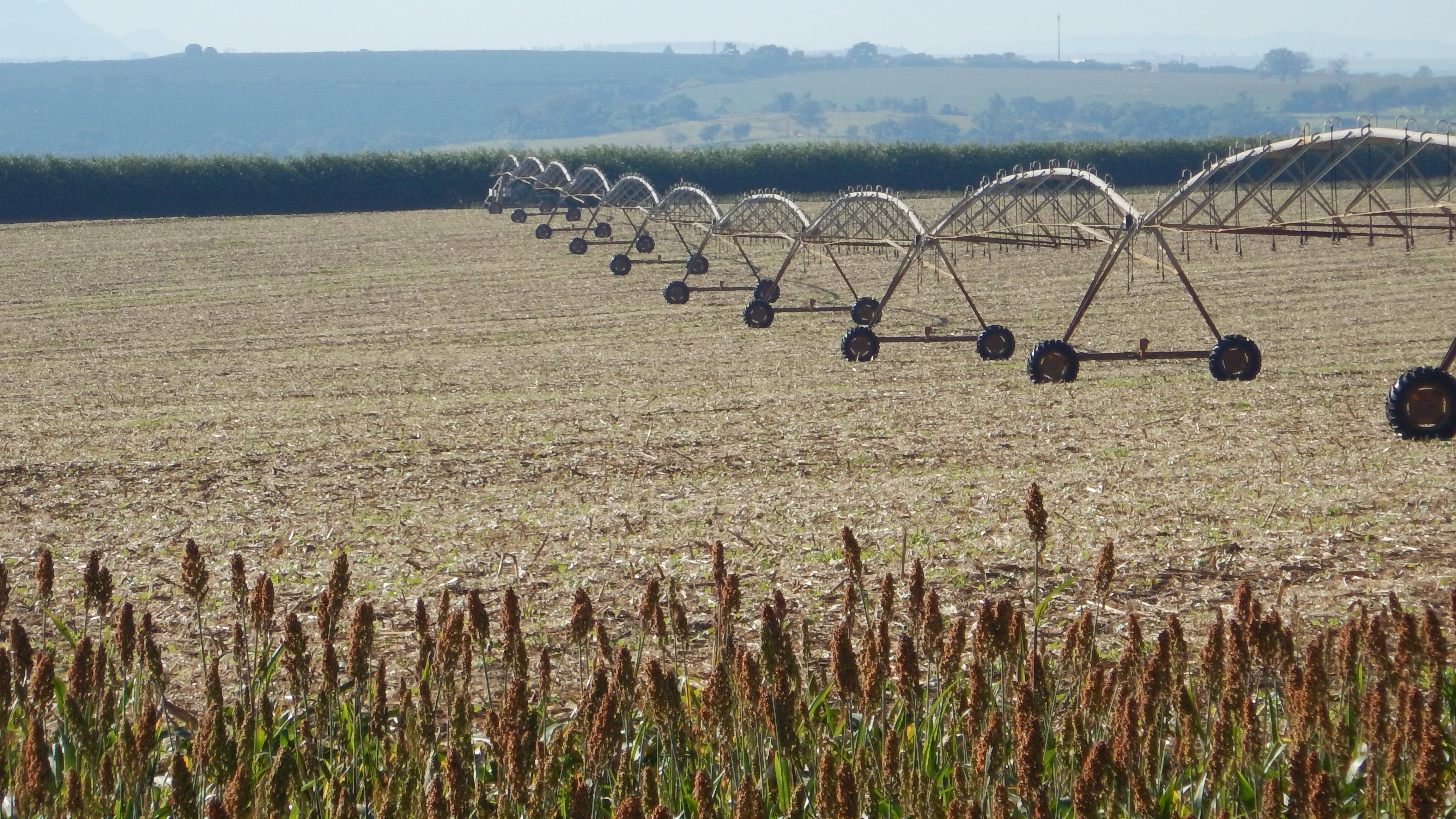 irrigação pivo central no sorgo 2016-07-10